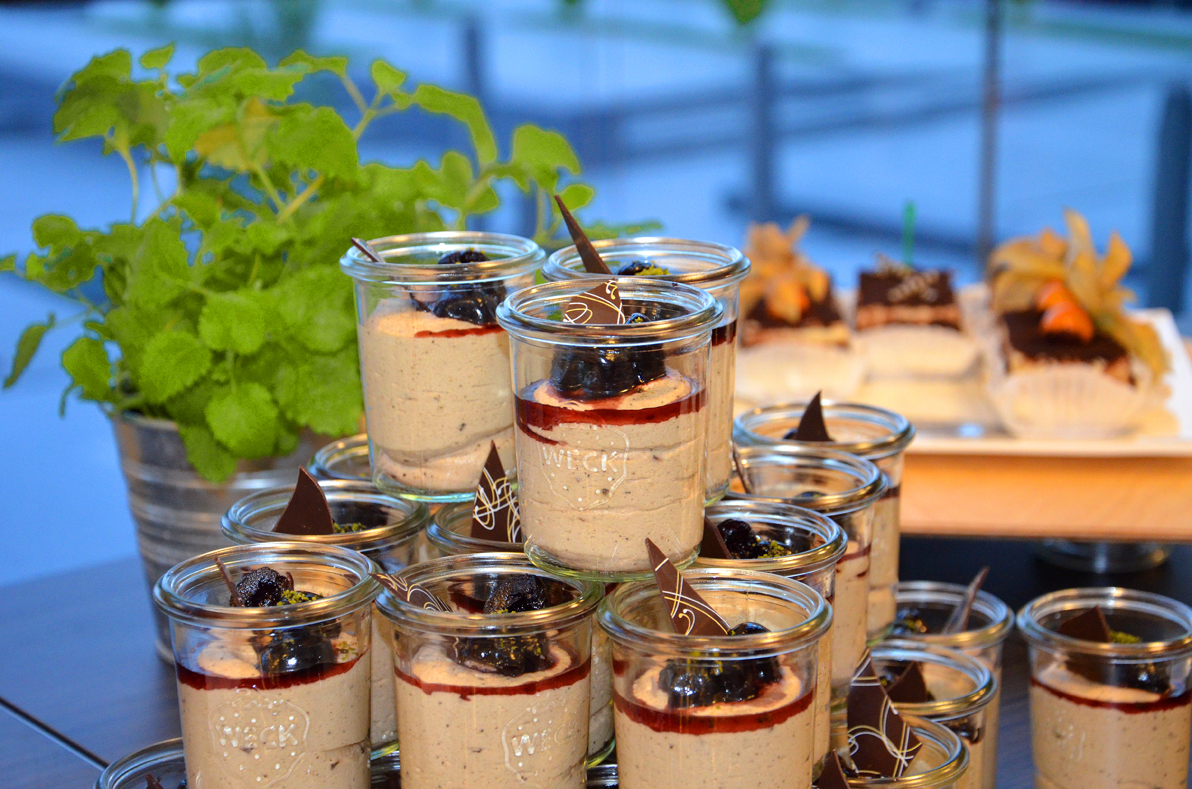 Während im Saal New York 1 der Halle 19 auf dem Messegelände Hannover noch die Vorträge zum „Expo 2015 Themenabend“ gehalten wurden, zu denen die Deutsche Messe AG, das EXPOSEEUM und der Freundeskreis Hannover geladen hatten, dekorierte das Team der Köchinnen und Köche das Buffet für die angekündigten „italienischen Gaumenfreuden“ für mehrere hundert Gäste ...